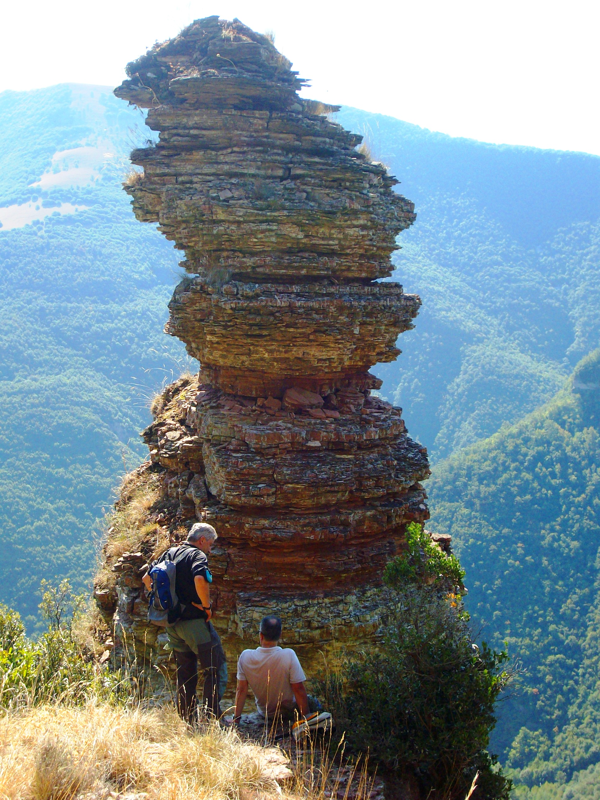 Pinnacolo di roccia eroso dagli eventi atmosferici c hiamato "Pajaro del Diavolo" nei pressi di Pianello di Cagli -PU-Italia